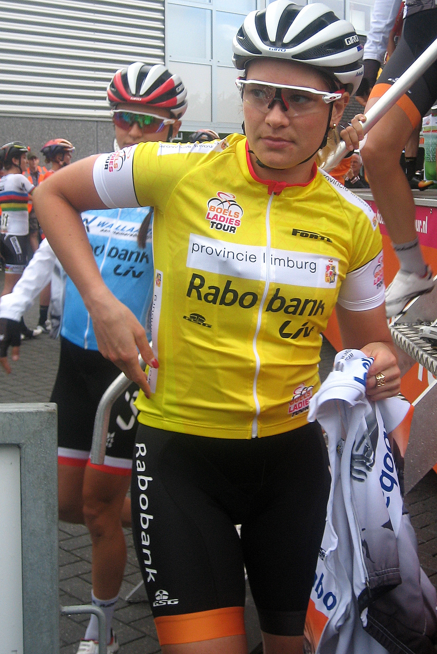 Roxane Knetemann (Rabo-Liv) voor start 6e etappe Holland Ladies Tour 2016